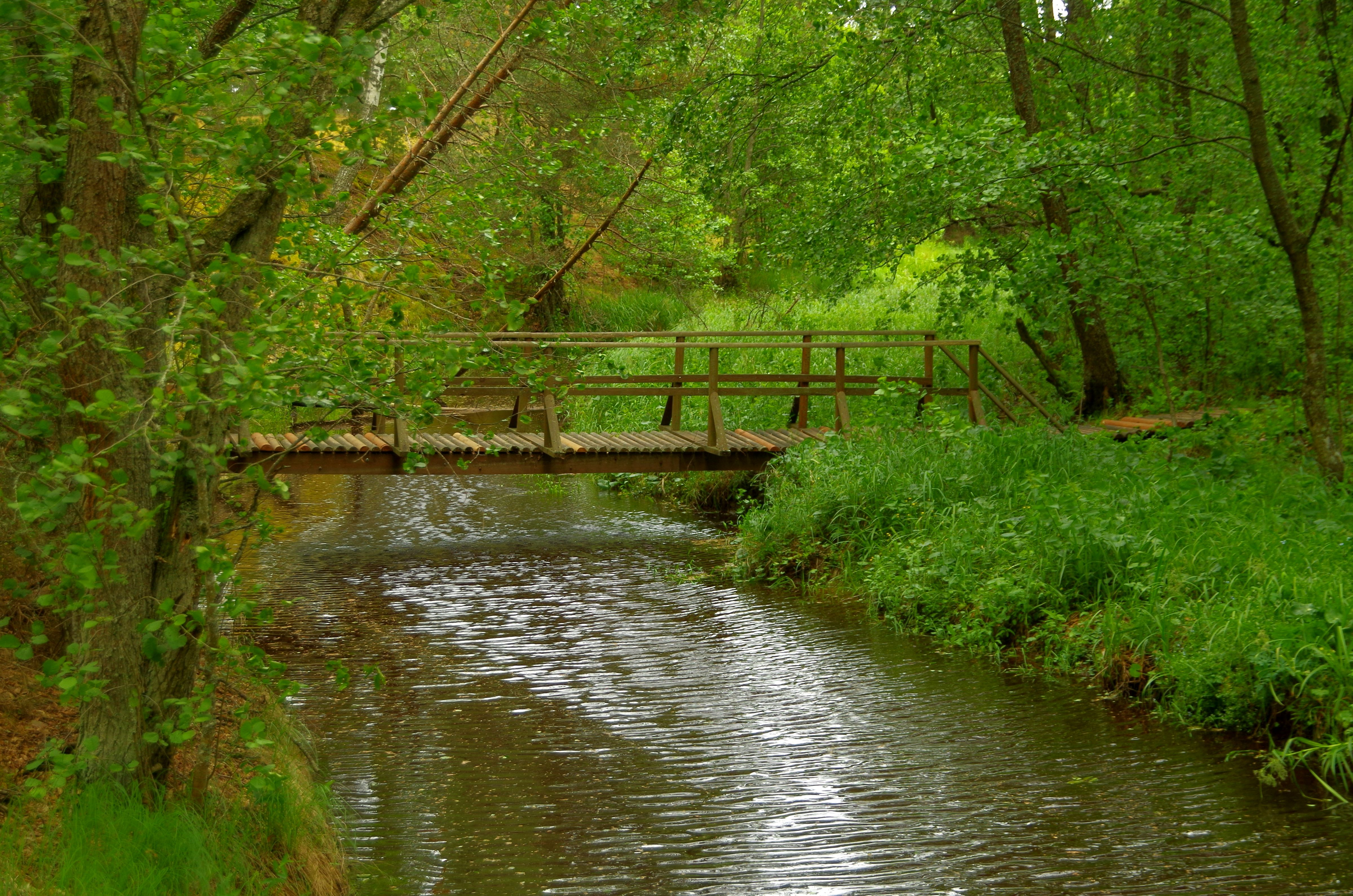 Kauksi oja asub Kauksi külas, Iisaku vallas, Ida-Virumaal.